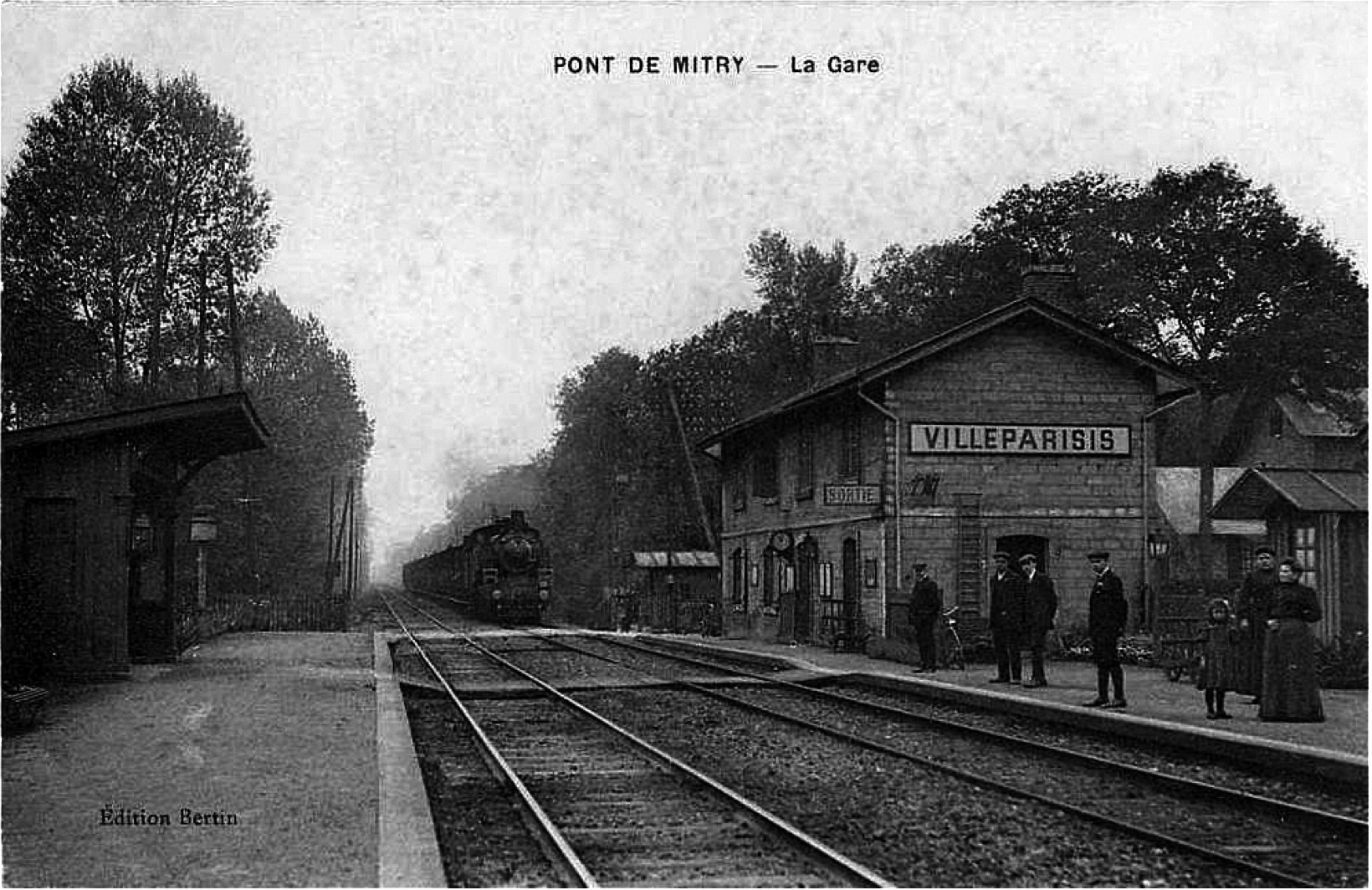 Intérieur de la gare de Villeparisis au pont de Mitry.